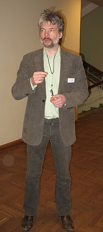 Agu Kivimägi Erakonna Eestimaa Rohelised Tallinna piirkonna asutamiskoosolekul Tallinna Ülikooli peahoones